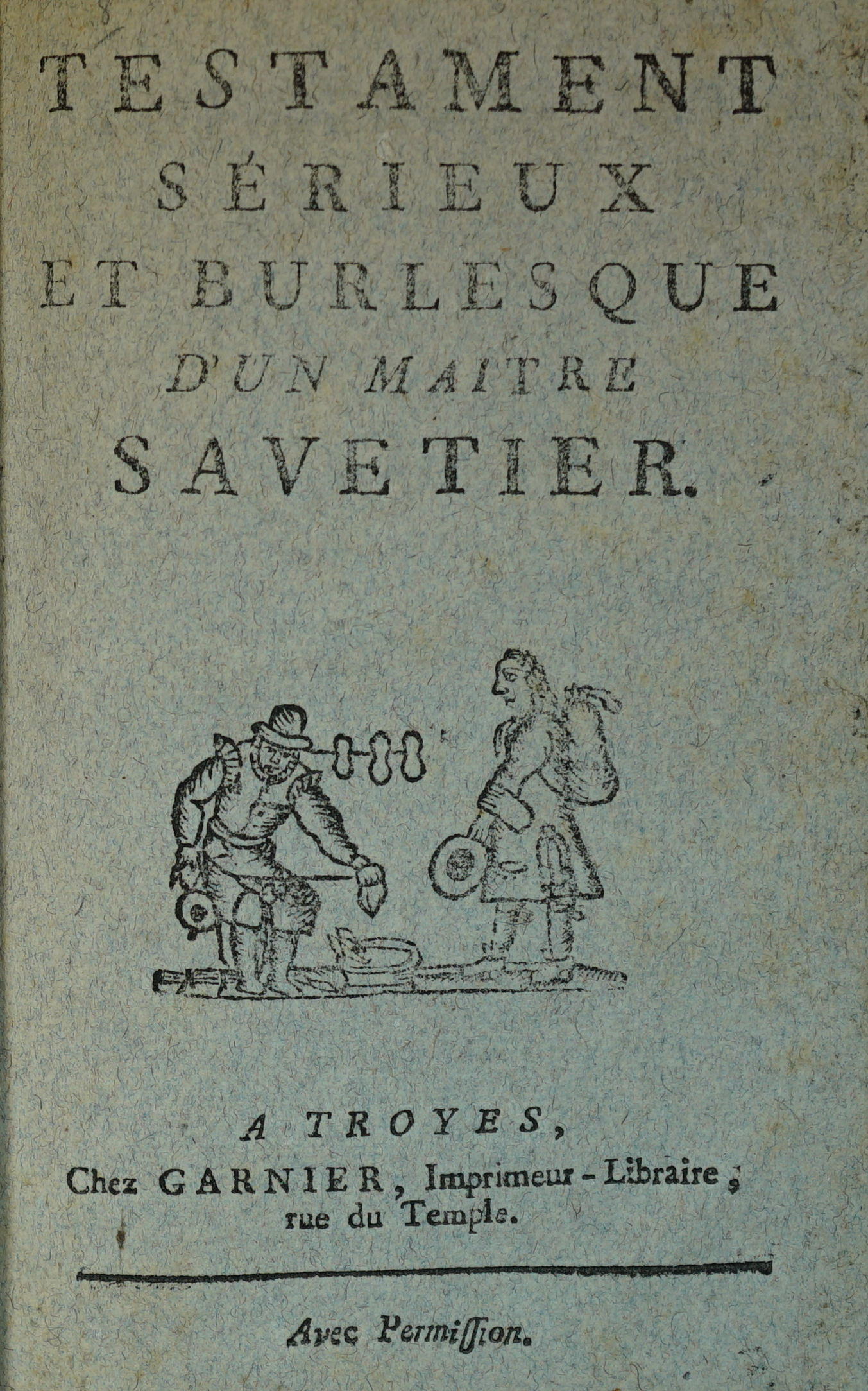 extrait du livre.